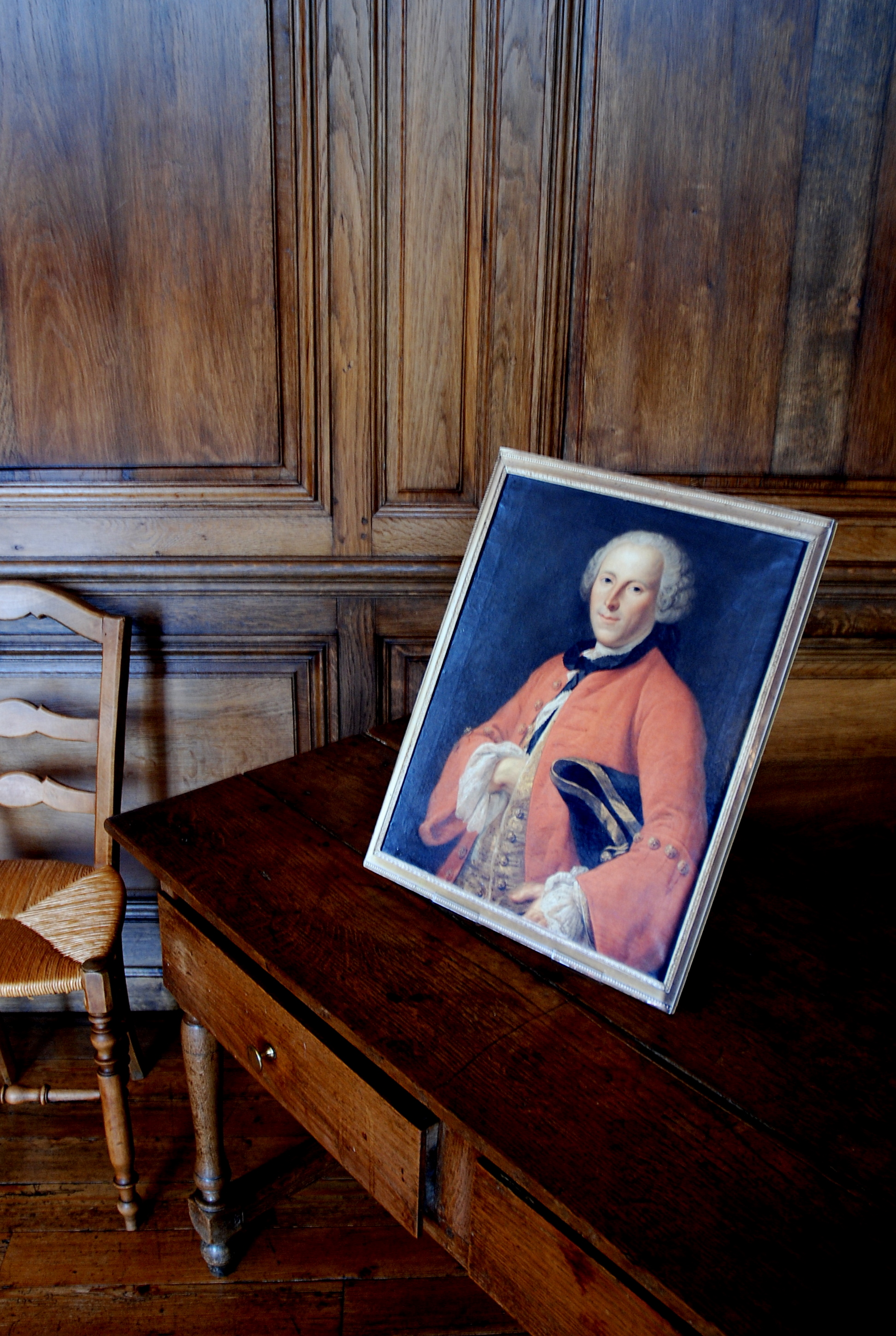 Simon Pfaff de Pfaffenhoffen dans la sacristie de l'abbaye de Valloires, France